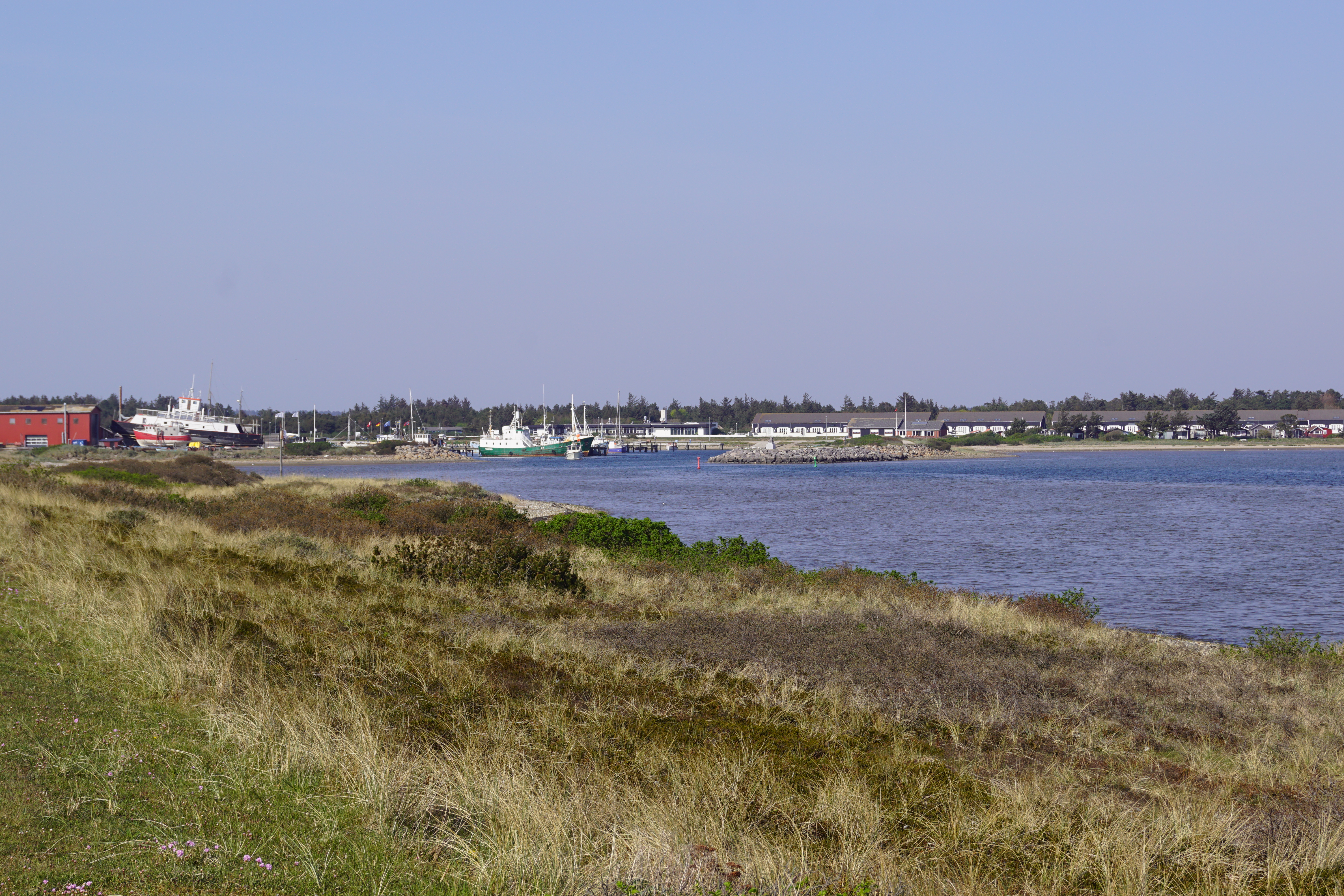 Bunden af Krik Vig set mod nordøst fra fra vejdæmningen